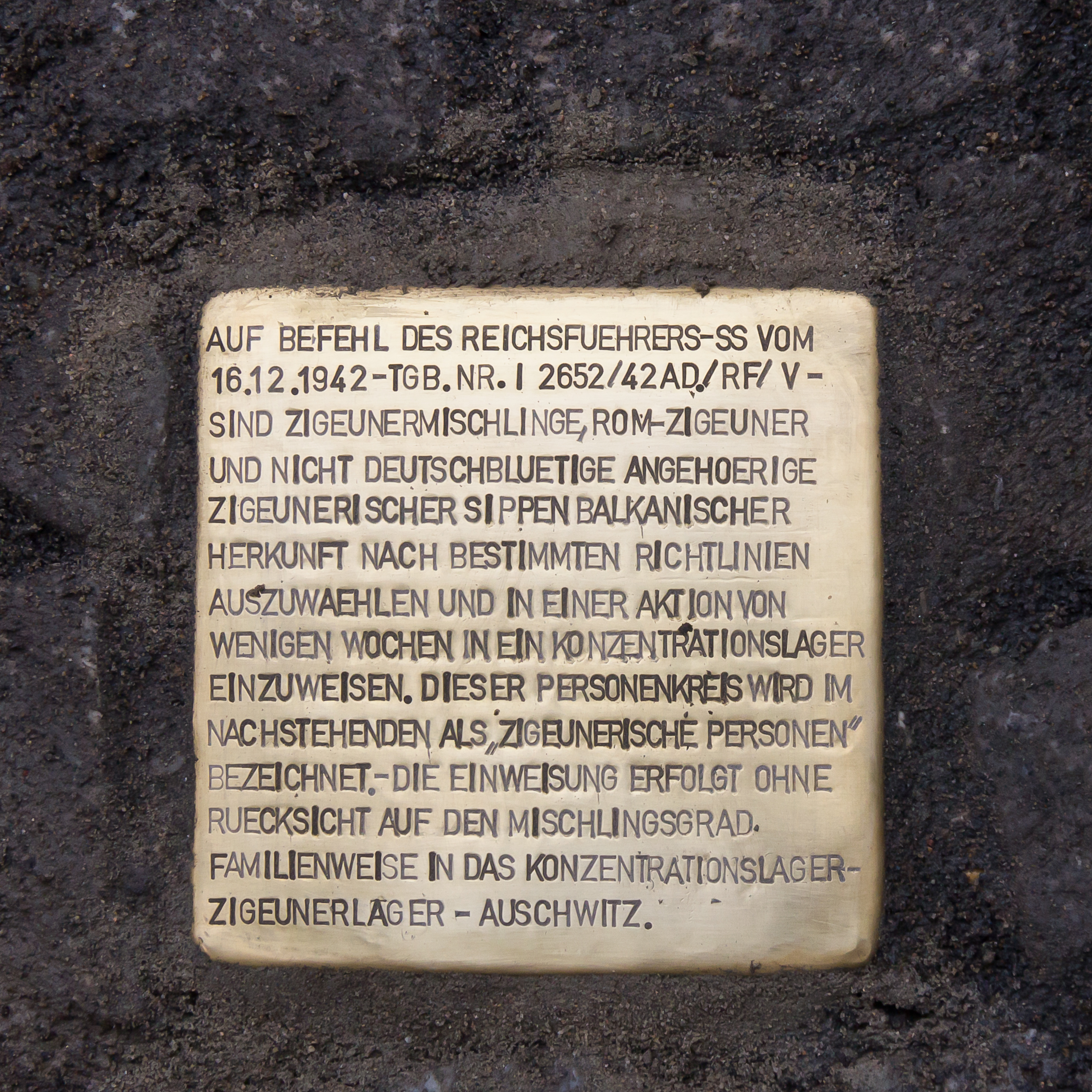 Verlegung eines Stolpersteins durch Günter Demnig vor dem Historischen Rathaus von Köln zur Erinnerung an den Befehl Heinrich Himmlers vom 16. Dezember 1942, die sogenannten „Zigeuner“ aus dem Deutschen Reich in das Konzentrations- und Vernichtungslager Auschwitz zu deportieren.